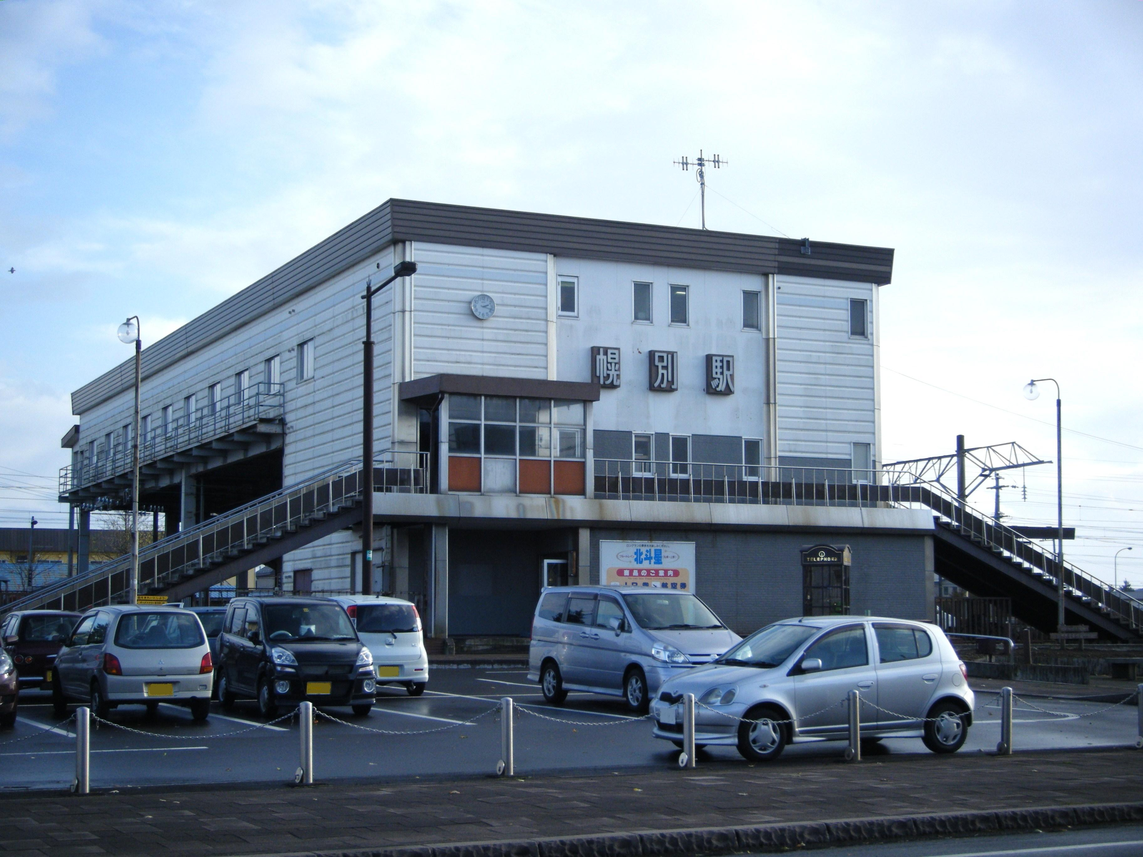 幌別駅駅舎 駅西口より（駅前郵便局前から撮影）